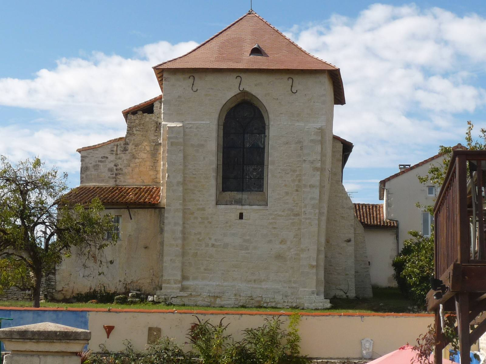 l'église de Condac, Charente, France